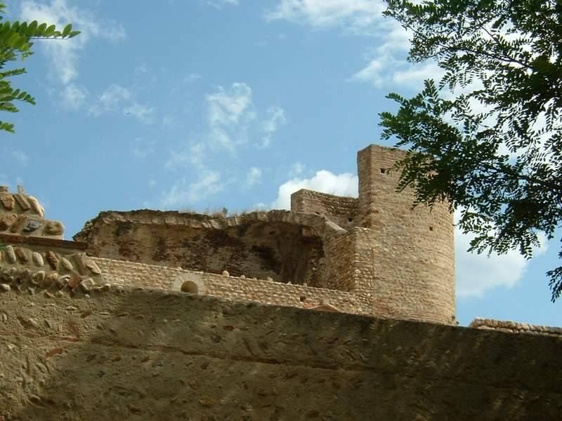 Castell de Canet de Rosselló